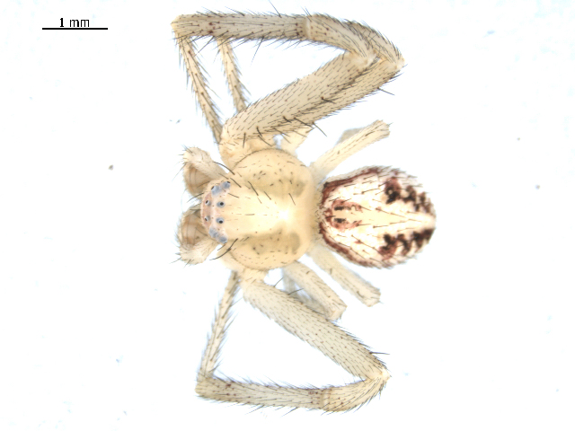 Mecaphesa sierrensis